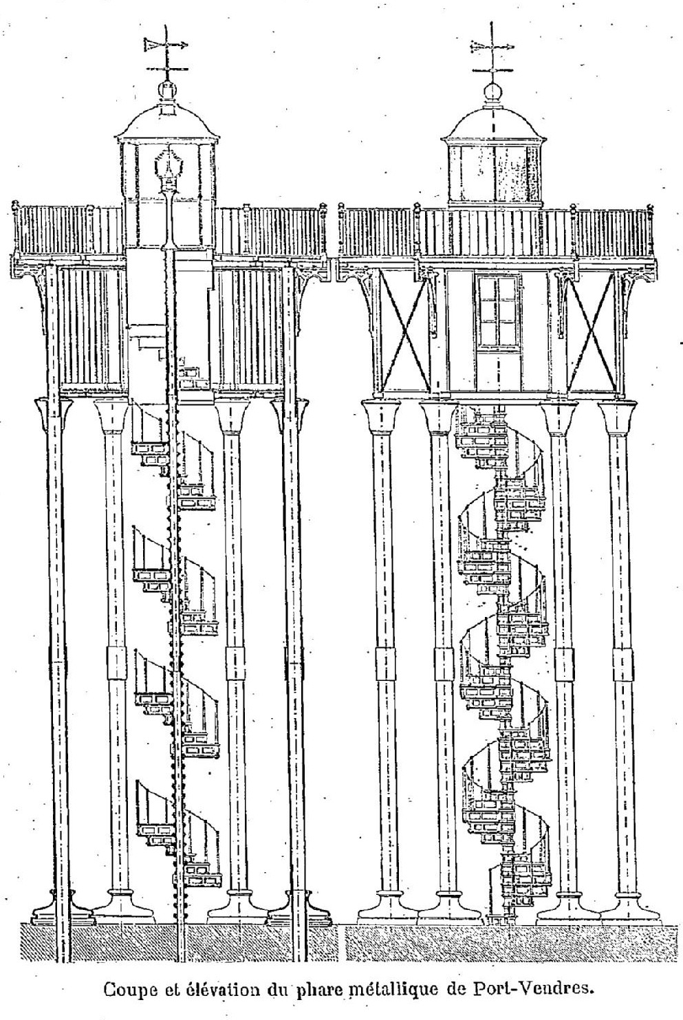 Plan de coupe du feu métallique du môle de Port-Vendres (1889).